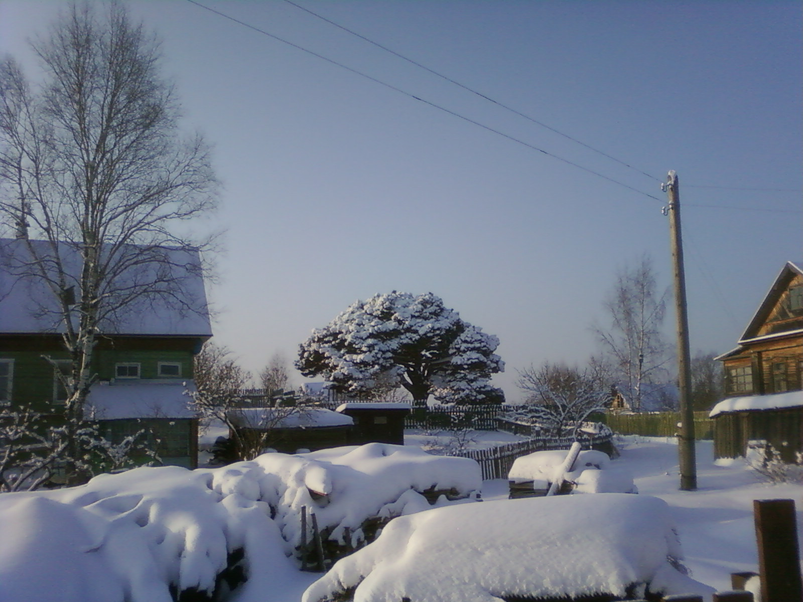 ботанический памятник — сосна Банкса у деревни Нутрома